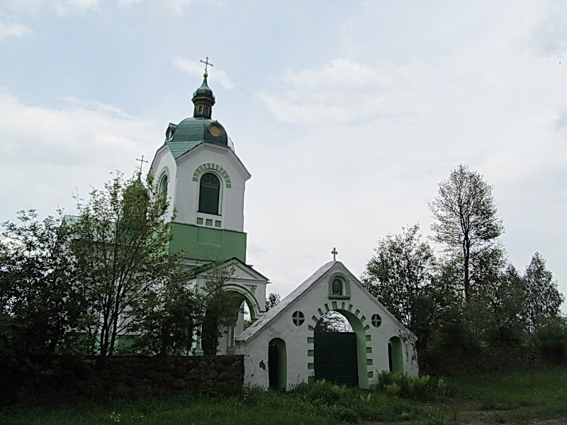 Мізгіры. Царква Святых Пятра і Паўла